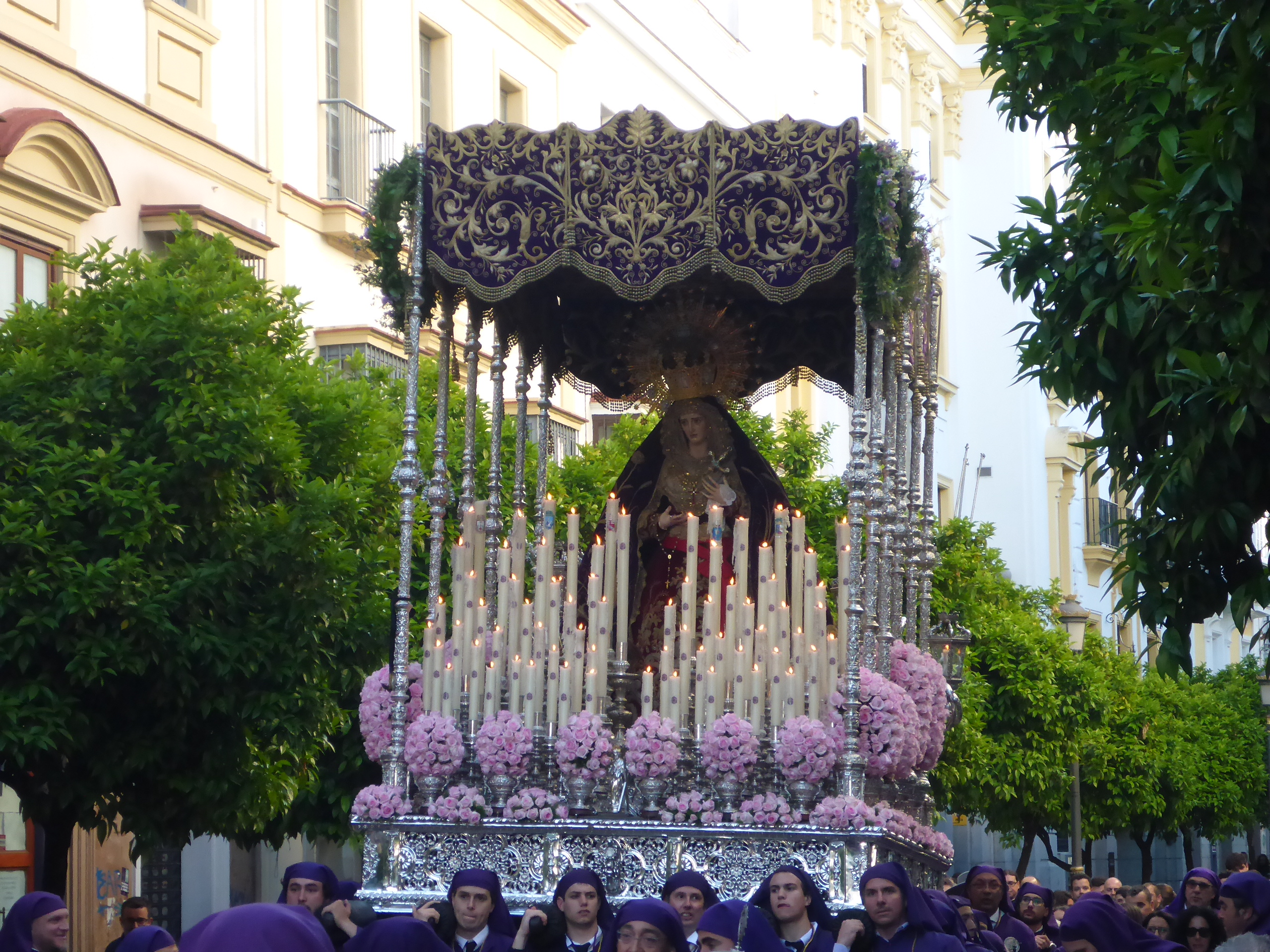 Hermandad Nuestro Padre Jesús Nazareno (Jerez)